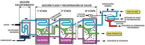 Efektu anitzeko destilazioa